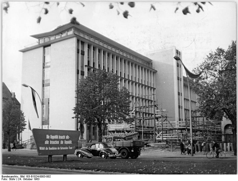 Berlin, neues Hauptpostamt Zentralbild Stöhr Neues Hauptpostamt in Berlin. Schön im Äusseren und ausgestattet mit der modernsten Fernmeldetechnik, modernen Stromversorgungs- und Klimaanlagen sowie einem umfanreichen Kabelnetz stellt sich in der Dottistraße der neue Fernmeldekomplex des Hauptpostamtes Berlin der Deutschen Post vor. Ab Mai 1964 werden diese modernen Anlagen betriebsfertig sein. UBz: Blich auf das Hauptamt Berlin von der Frankfurter Allee.